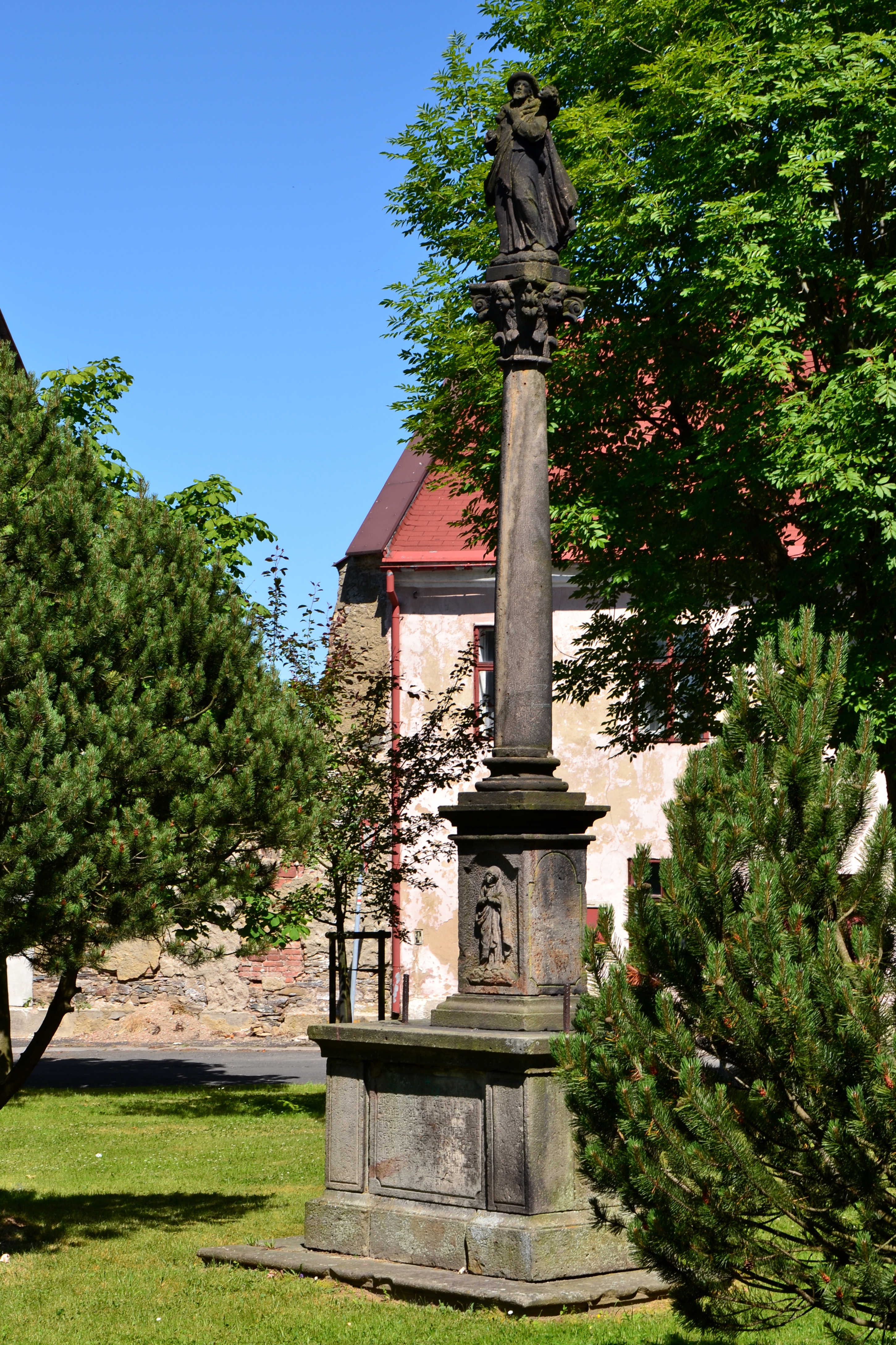 Sloup se sochou Dobrého pastýře, Hora Svatého Šebestiána.